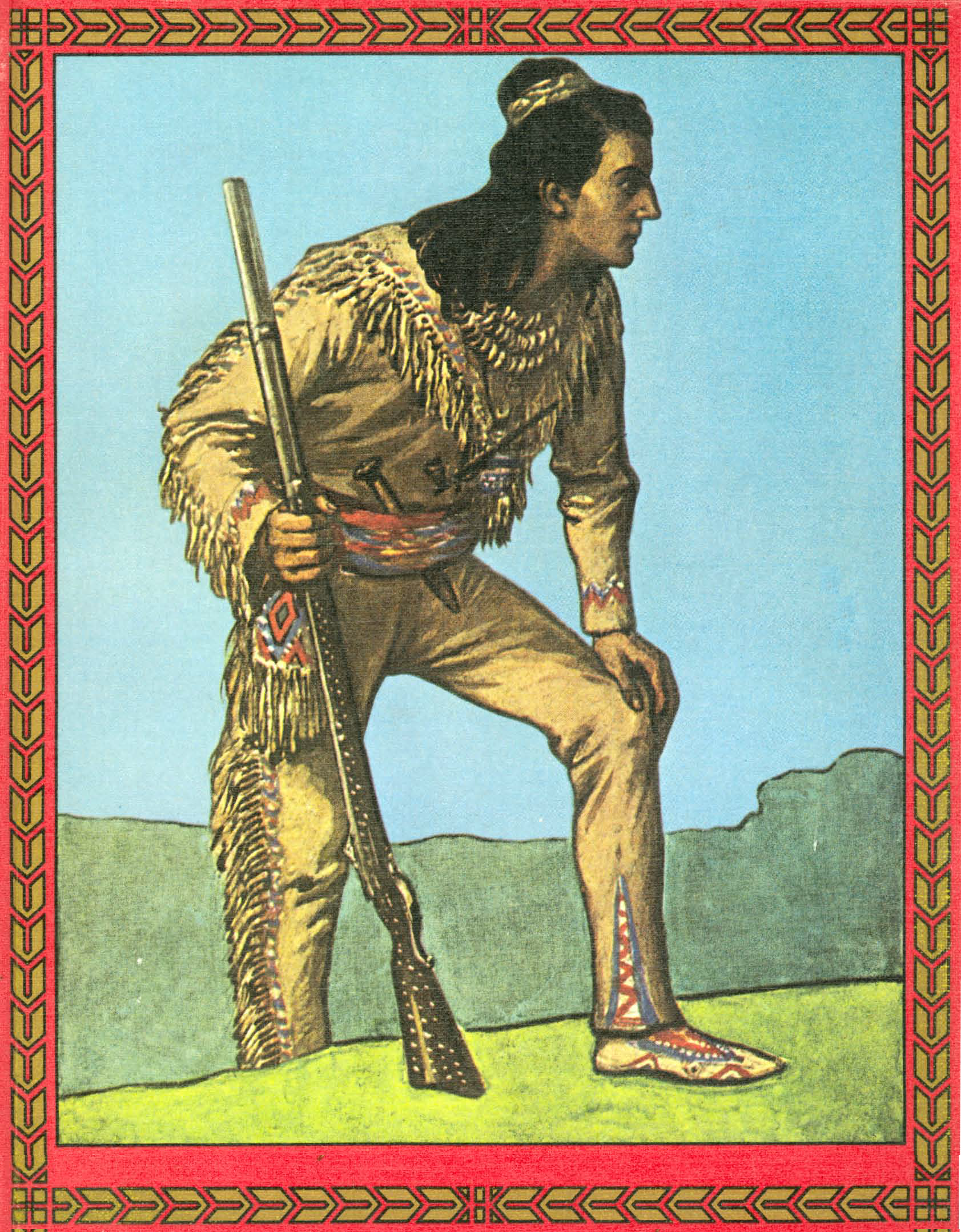 grafika z książki DE